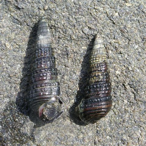 カワアイ。長崎県西海市(Cerithidea djadjariensis, in Saikai, Nagasaki)